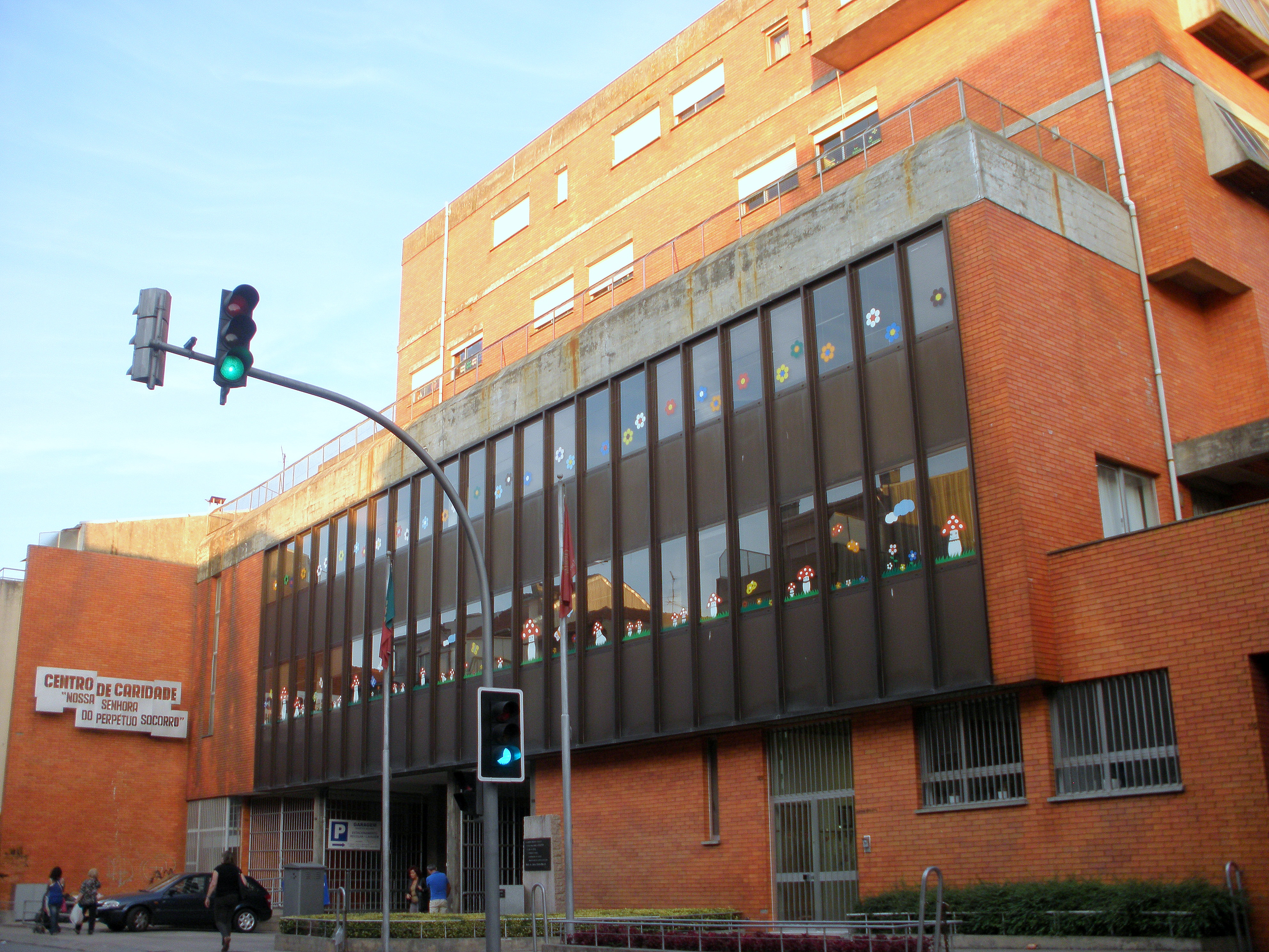 Centro de Caridade de Nossa Senhora do Perpétuo Socorro, na Rua de Costa Cabral, Bonfim, Porto, Portugal. This file was uploaded for Wiki Loves Monuments in Portugal with the unique identifier 328041.